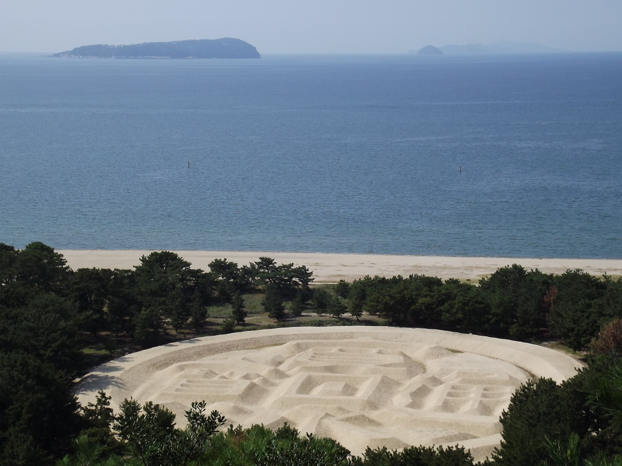 伊吹島が水平線に浮かぶ